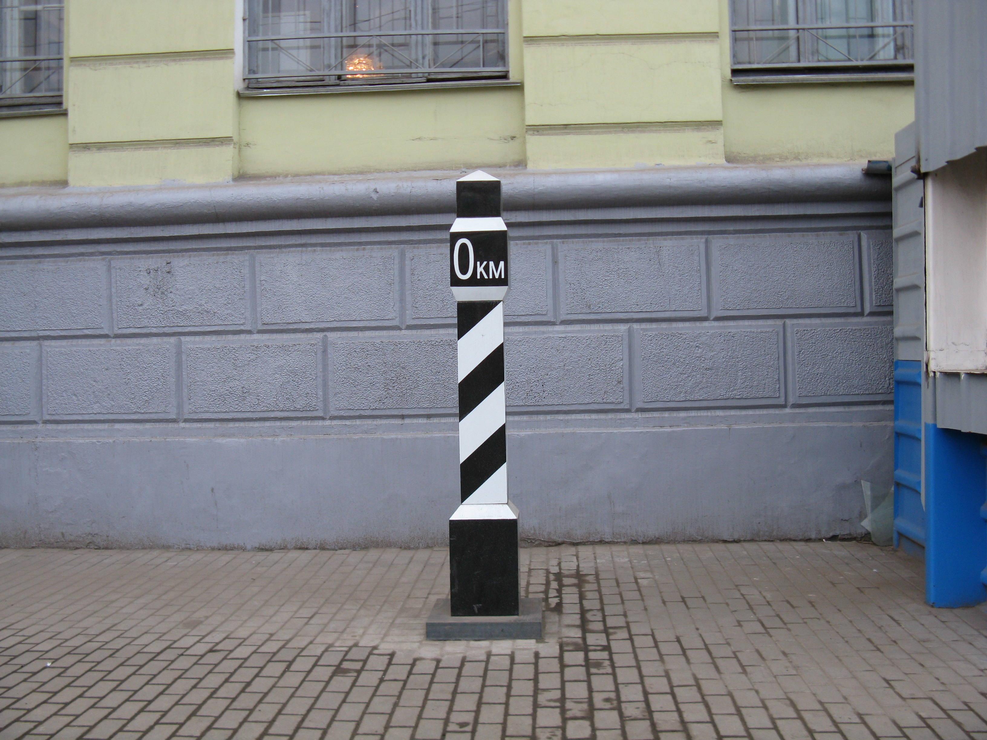 Монумент "Нулевой километр" на проспекте Ленина возле Центрального Почтамта.